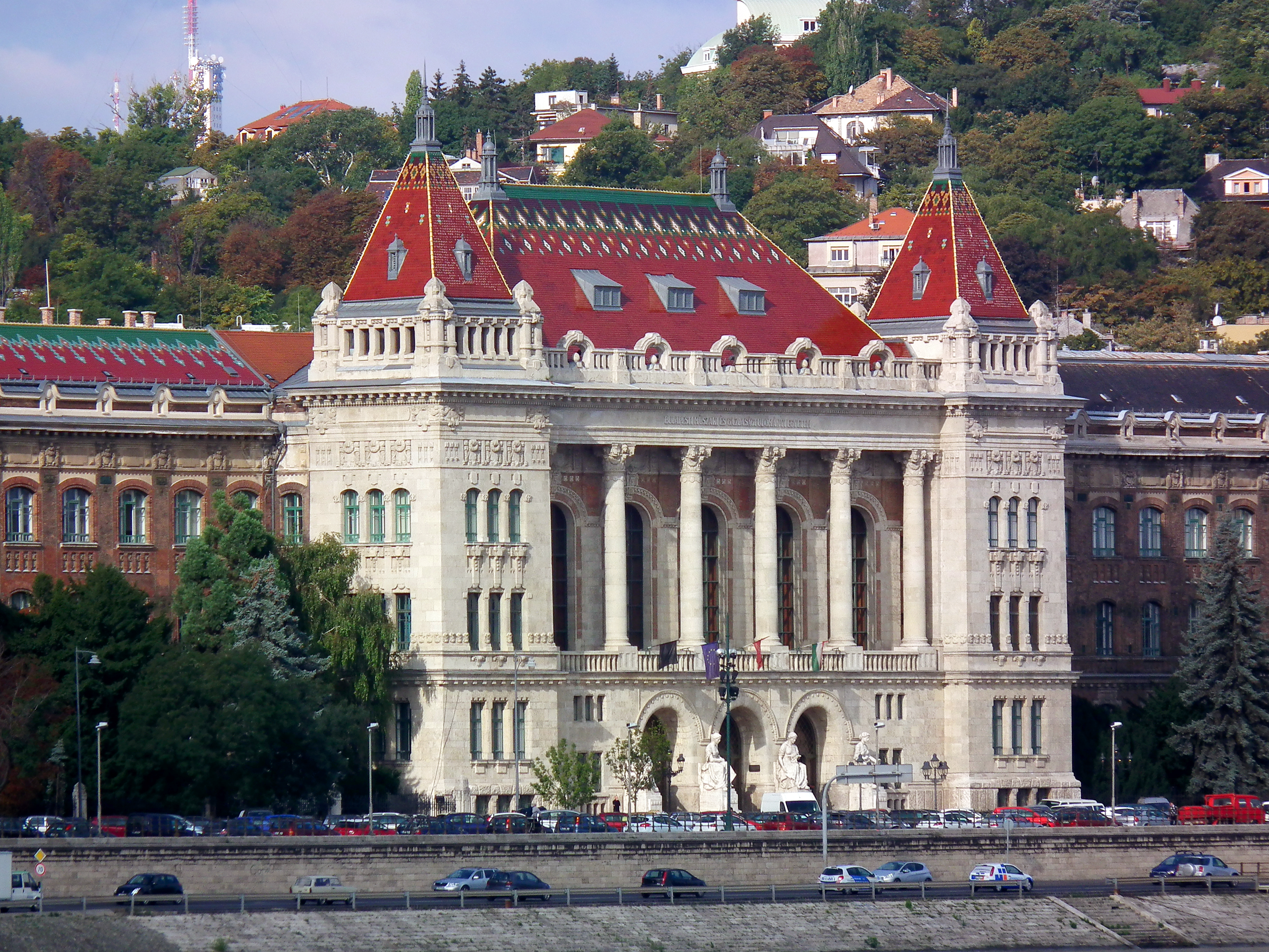 Budapesti Műszaki Egyetem K épülete This is a photo of a monument in Hungary. Identifier: 1110